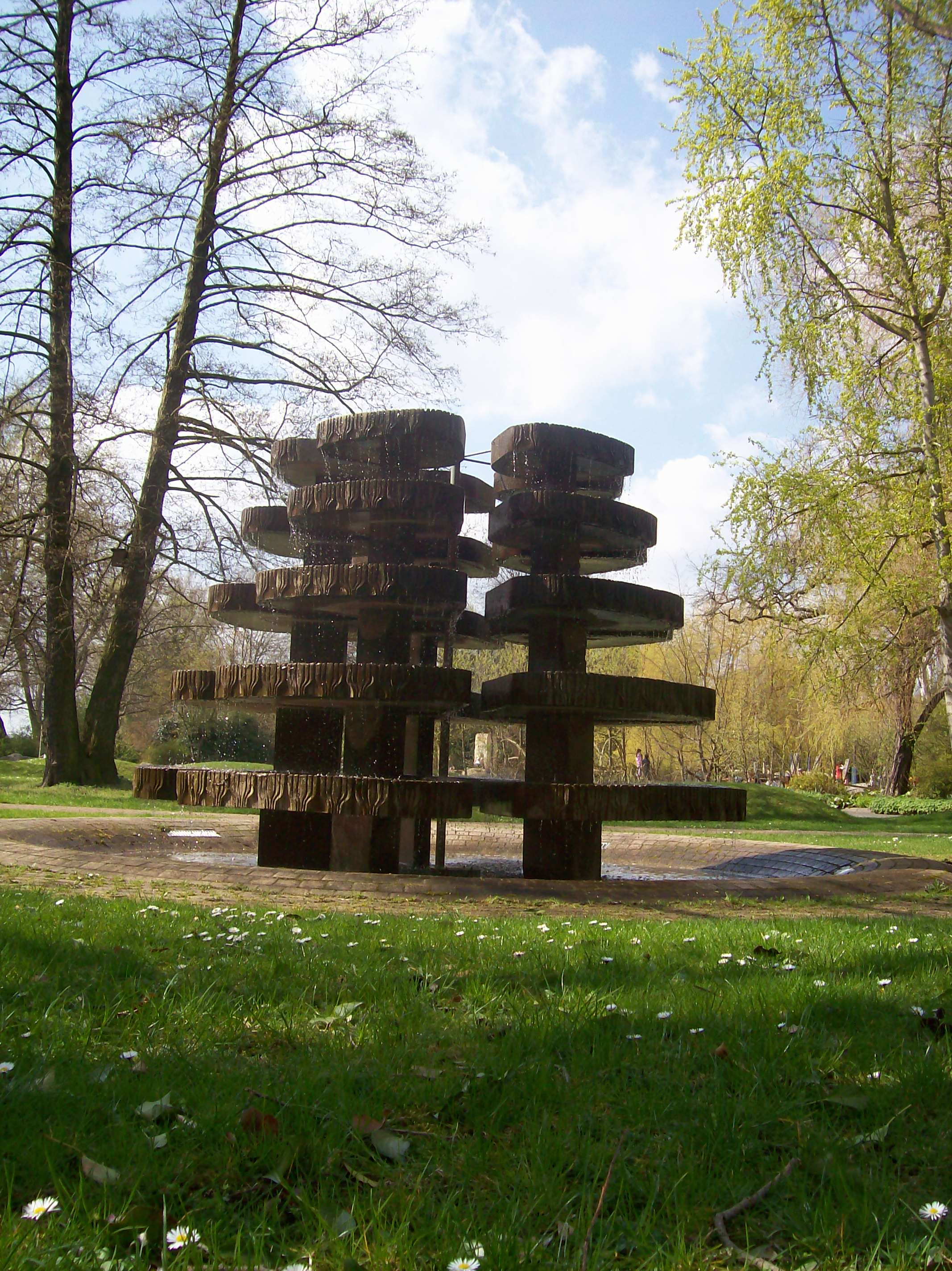 Springbrunnen auf der Freundschaftsinsel in Potsdam, von den Künstlern Eberhard Bachmann (Berlin), Heinz Dübel und Gorch Wenske; wurde in Vorbereitung der Weltfestspiele der Jugend und Studenten 1973 angefertigt und aufgestellt.